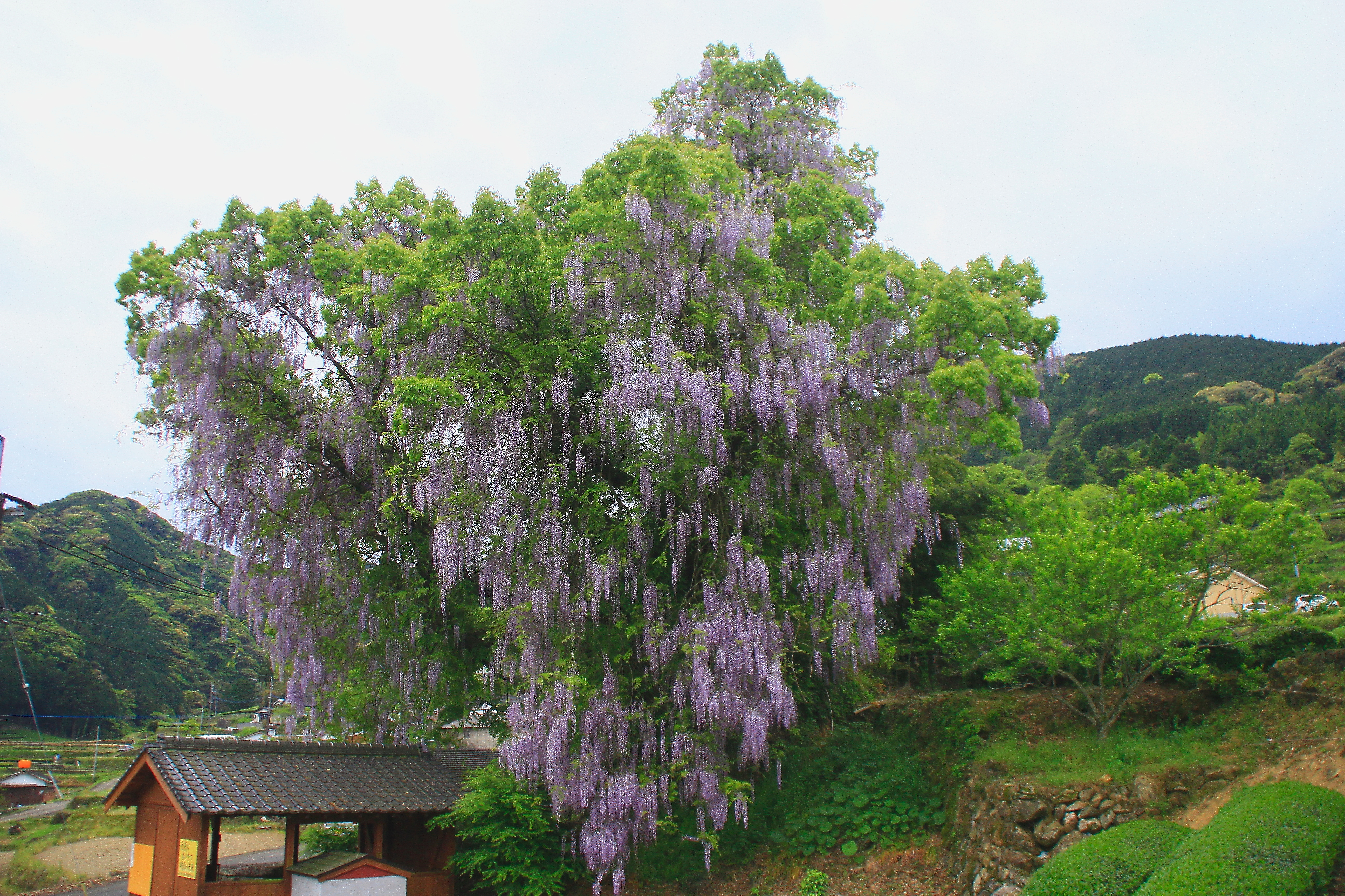 佐賀県嬉野市嬉野町吉田西川内にある大藤 Canon EOS 60D